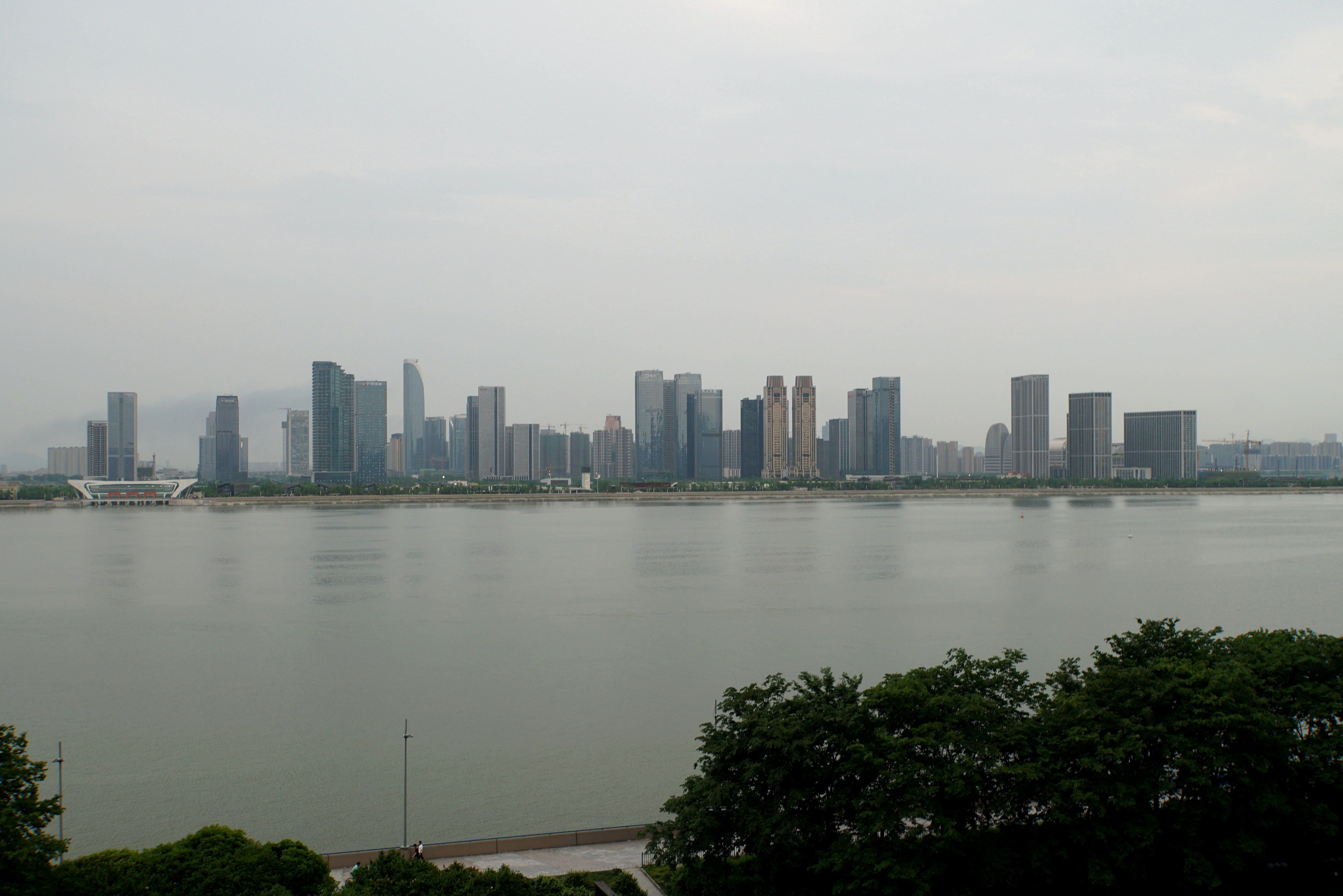 从江北观看钱江世纪城，2018年4月